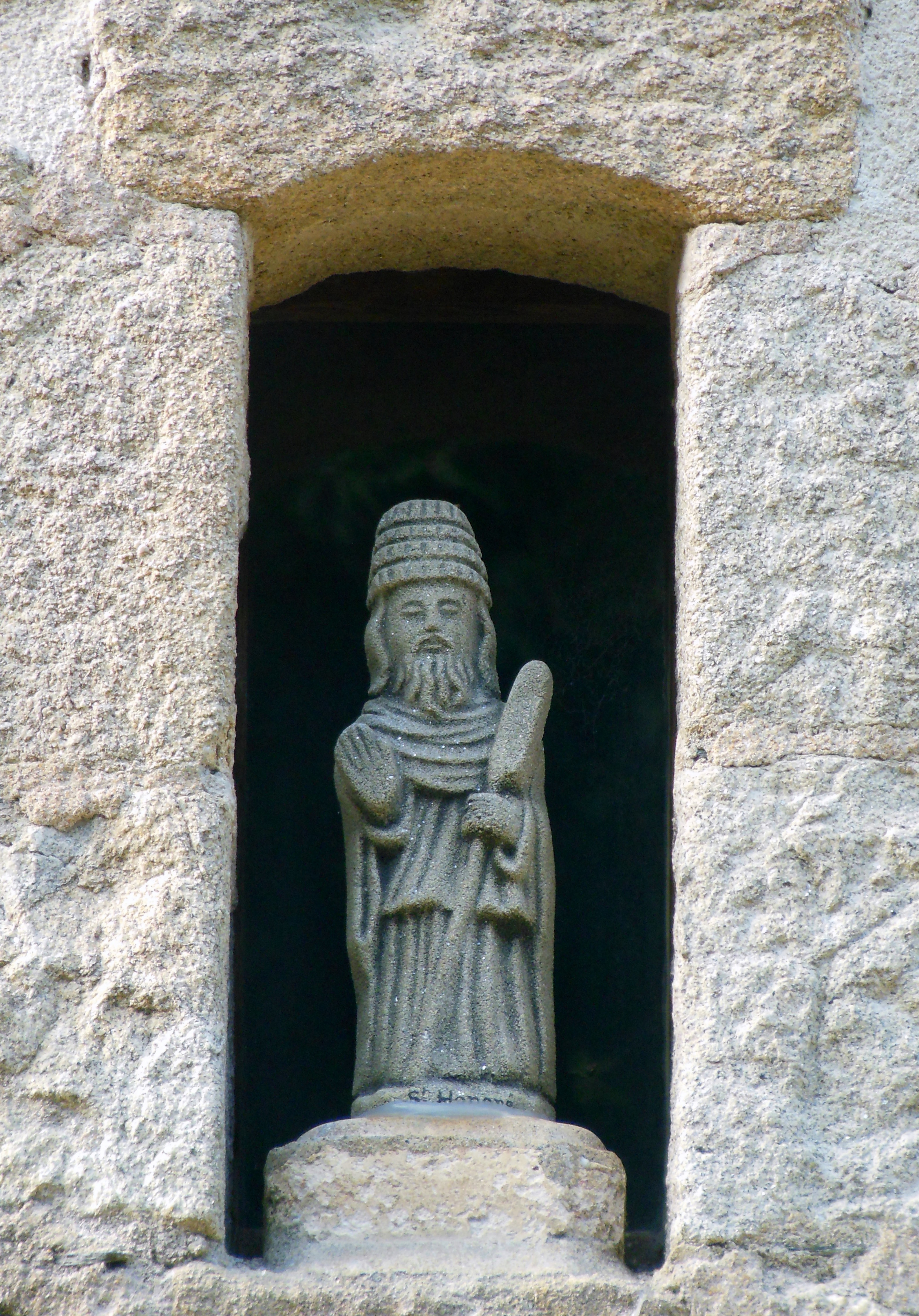 Moulin de la Providence (Le Croisic), statue de saint Honoré, saint patron des boulangers